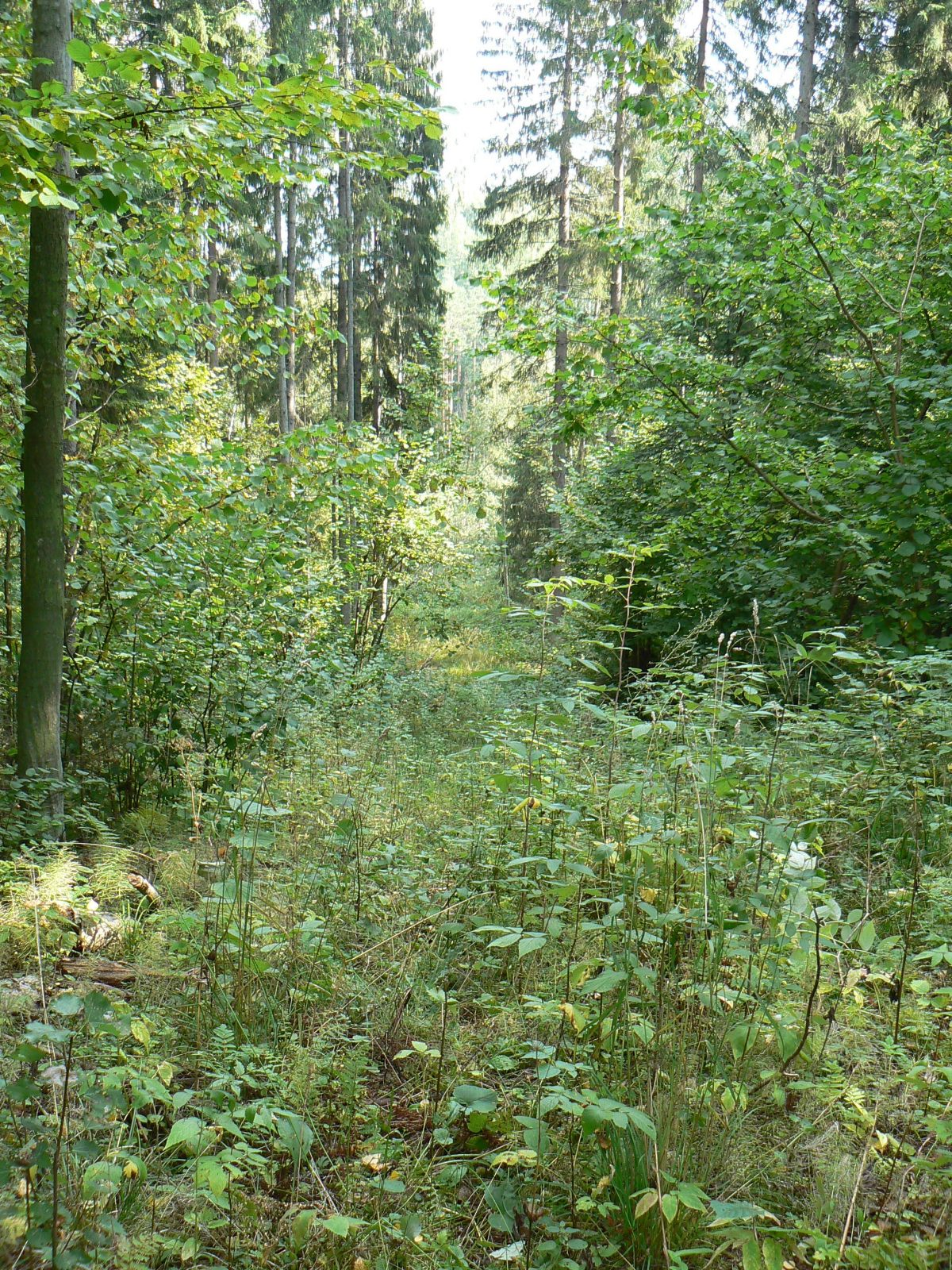 Kinnikasvav metsasiht Prangli laane lõunaosas